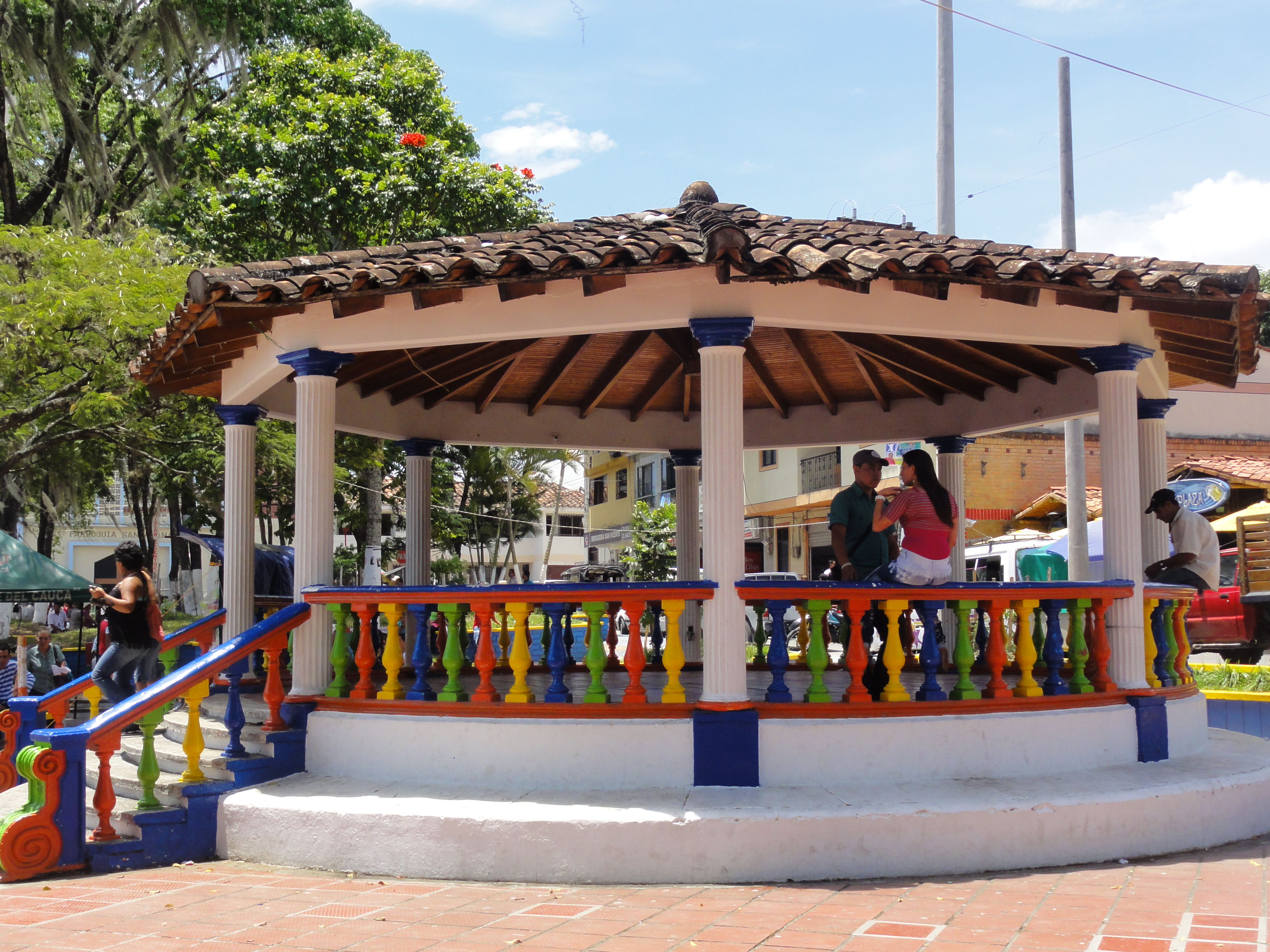 Parque Central. Kiosco de la Retreta. Ansermanuevo, Valle, Colombia.